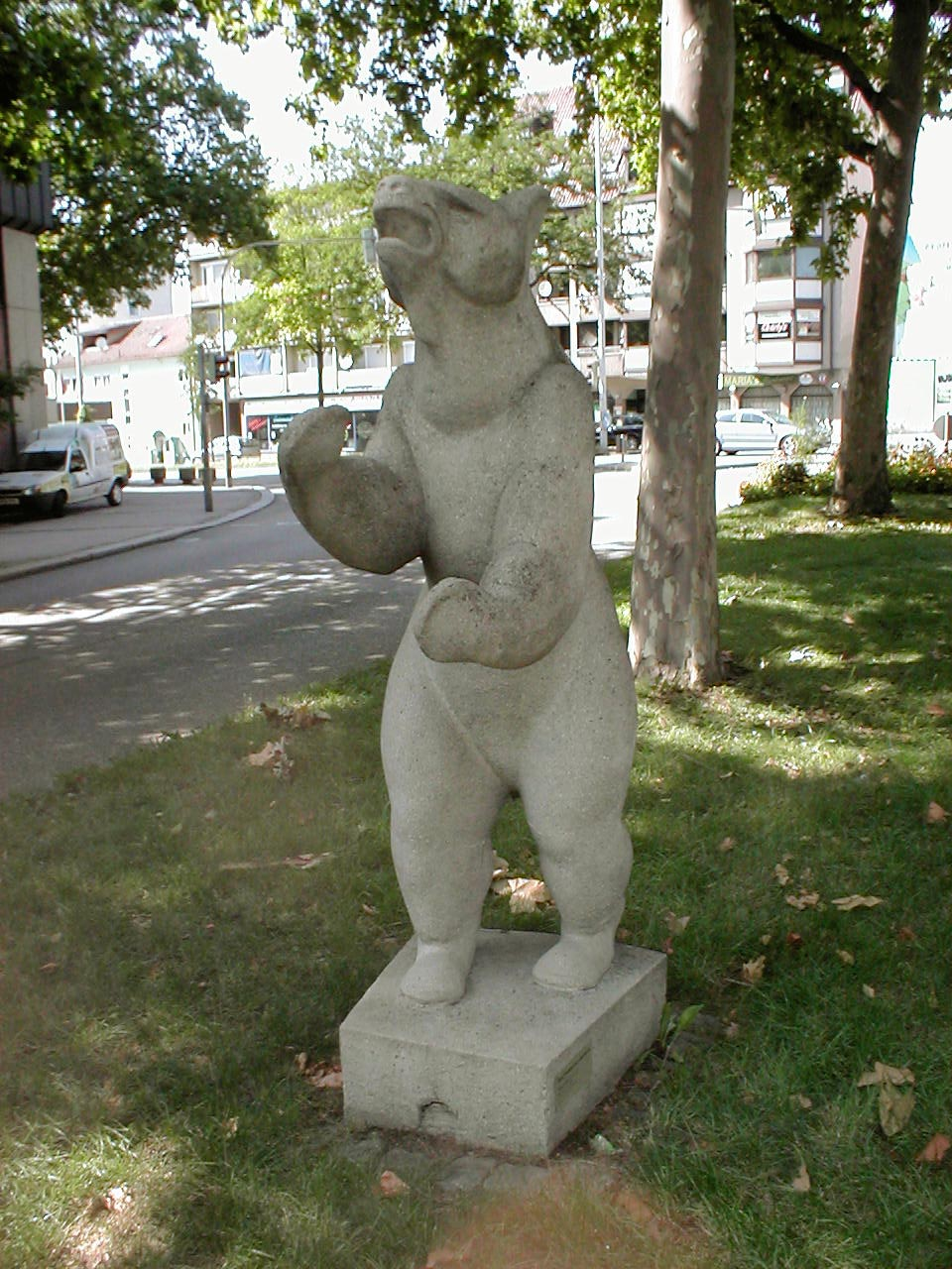 Berliner Bär nahe dem Heilbronner Stadttheater, Relikt des ehemals dort befindlichen Bärenbrunnens